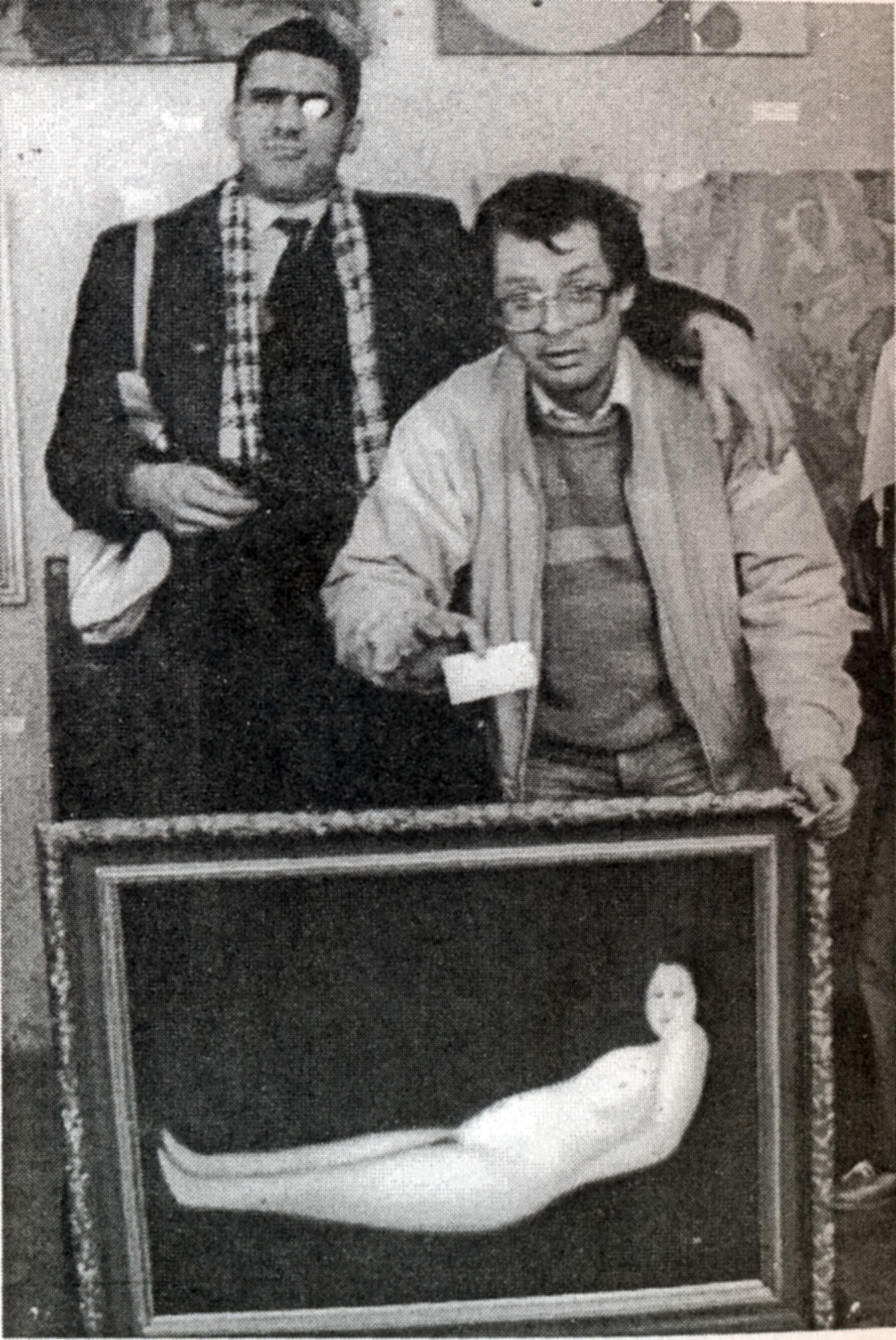 Художники Авдей Тер-Оганьян и Юрий Палайчев на фоне картины Полайчева "Новая обнаженная", Таганрог, 1988 г., "Однодневная выставка".